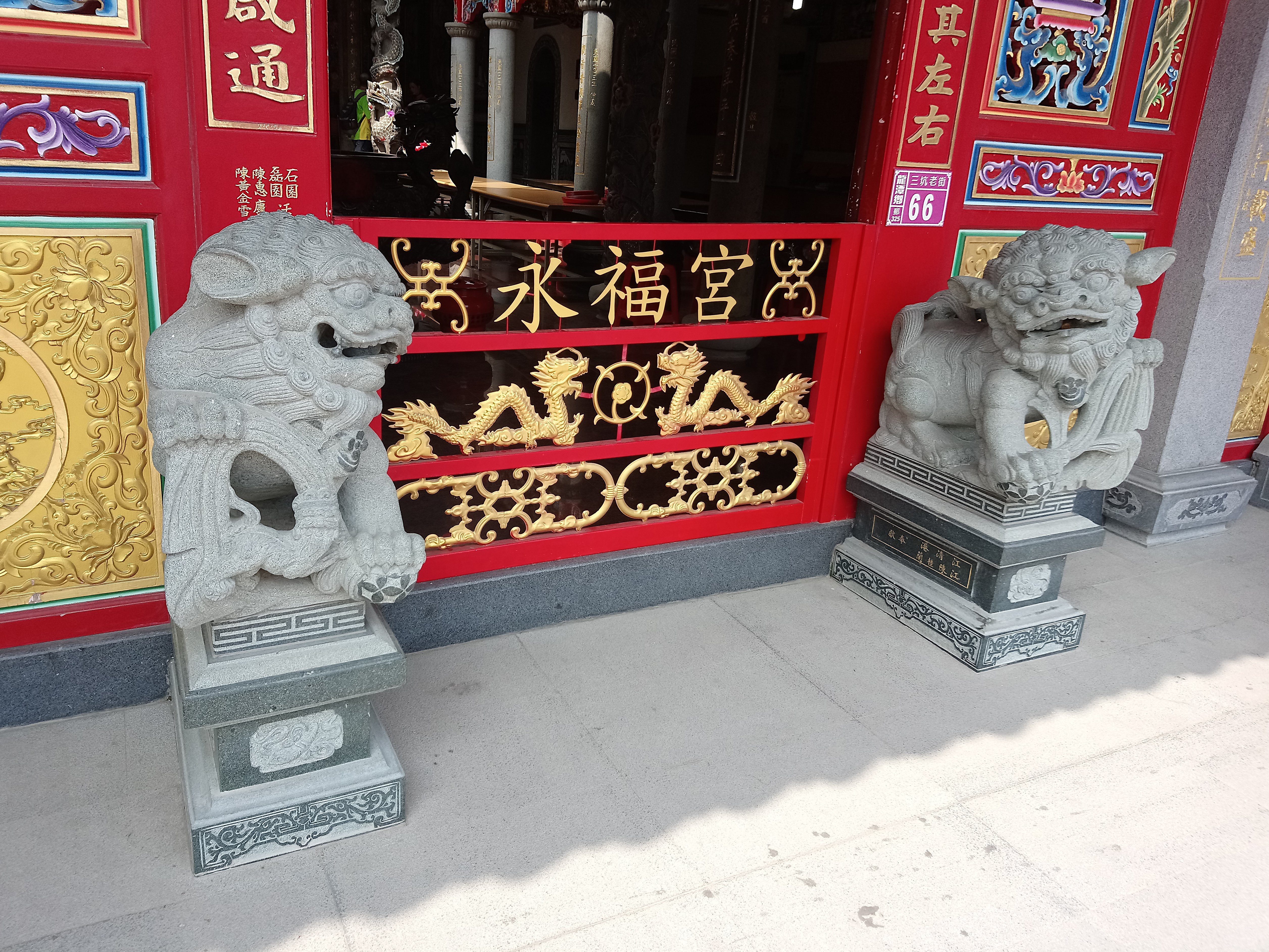 三坑子永福宮,桃園市龍潭區三坑里